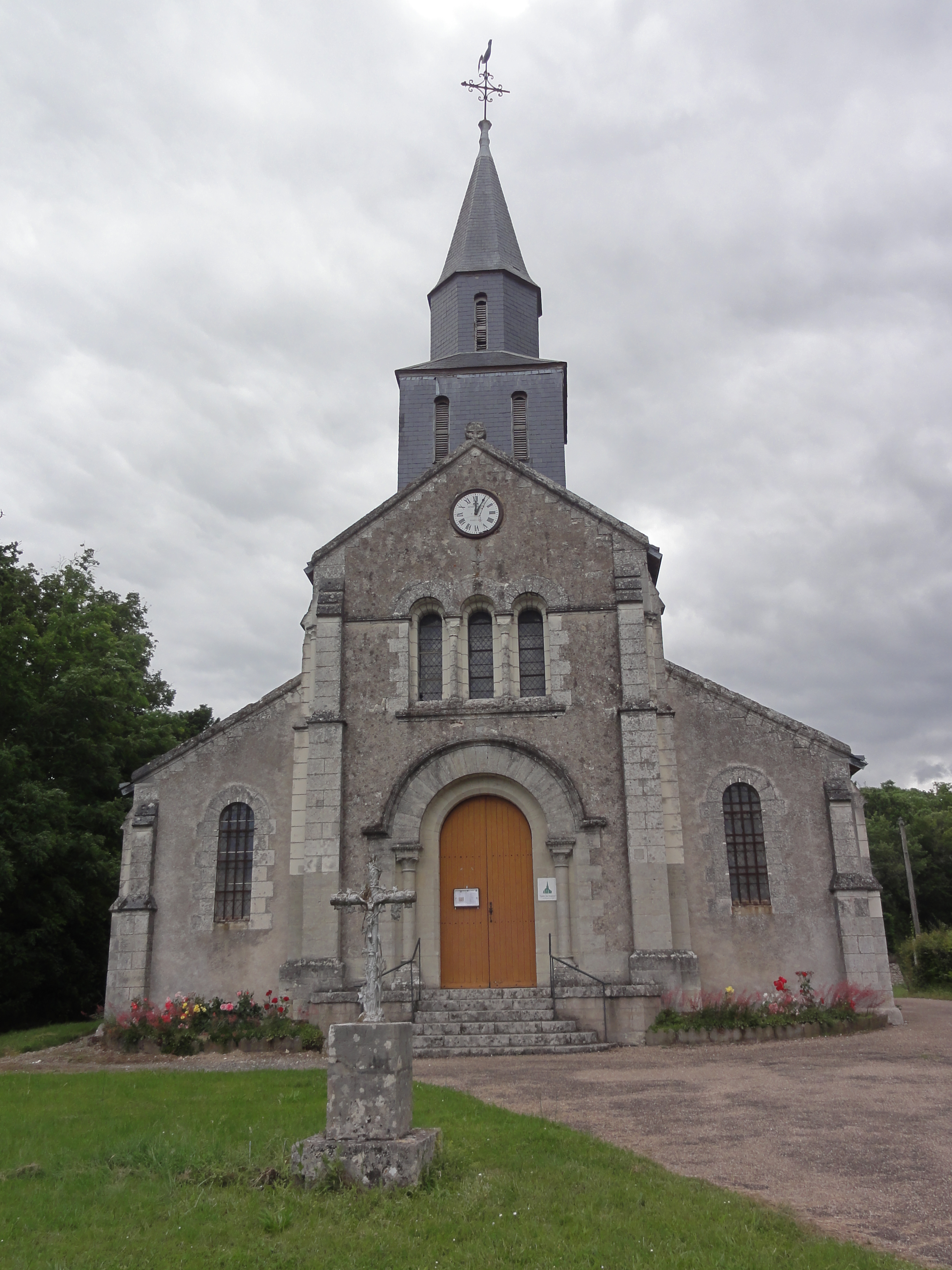 Rilly-sur-Loire (Loir-et-Cher) Église